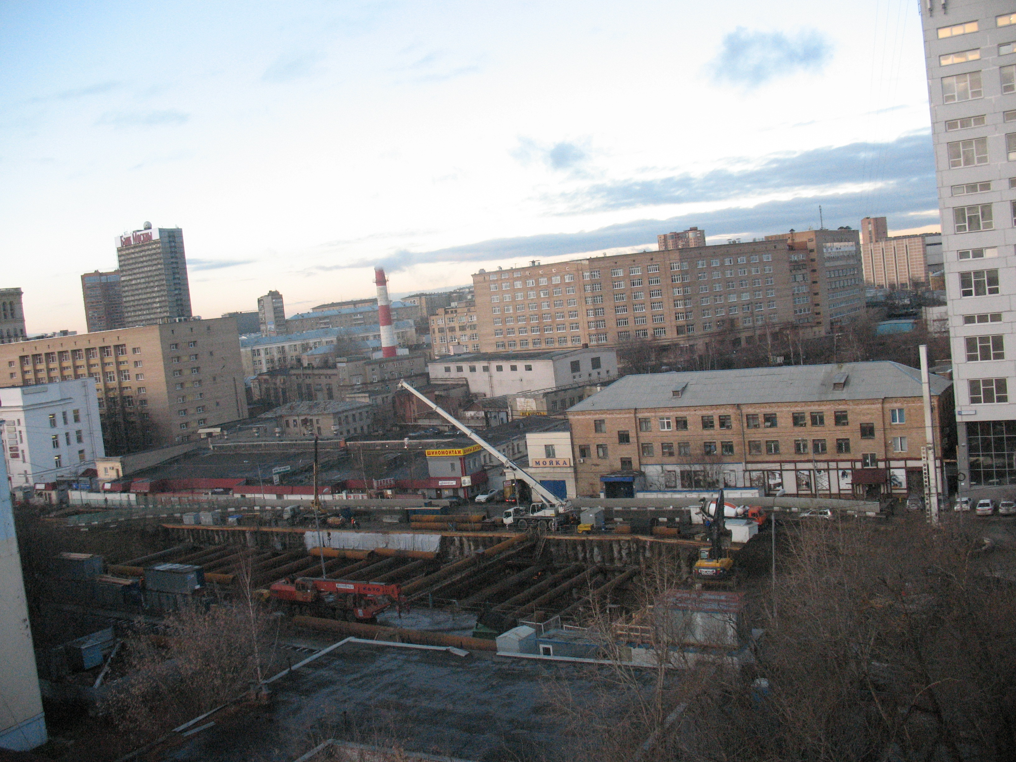 Строительство на Балтийской улице Москвы. Декабрь 2011.